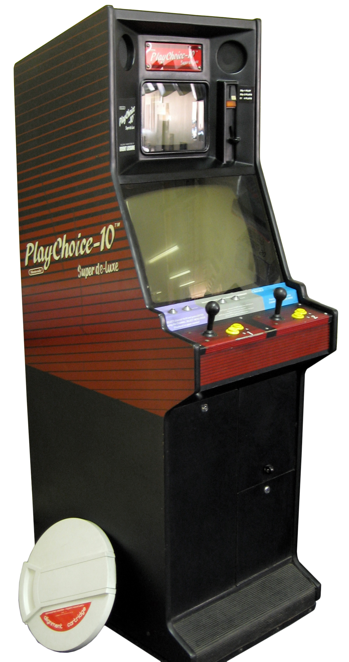 PlayChoice-10 Super de-luxe Arcade cabinetPlayChoice-10